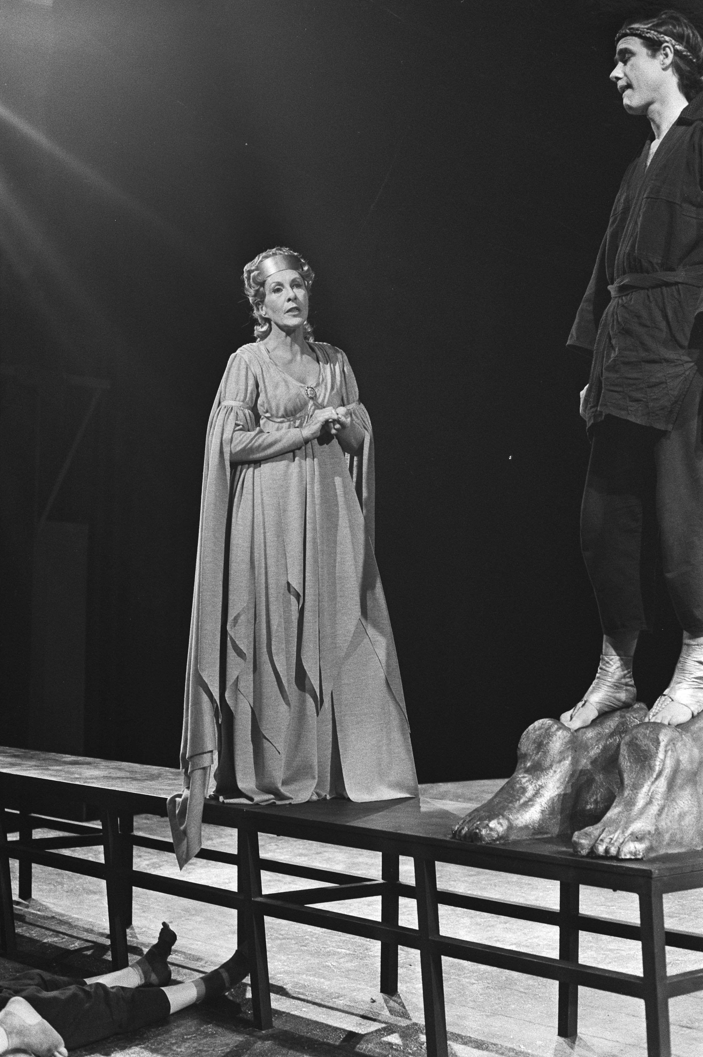 Collectie / Archief : Fotocollectie Anefo Reportage / Serie : TV: toneelstuk Oedipus van Hugo Claus door Nieuw Rotterdams Toneel voor VARA Beschrijving : Josephine van Gasteren als Iokaste Datum : 4 juni 1971 Trefwoorden : acteurs, mythologie, televisie, toneel, werkopnamen Persoonsnaam : Gasteren, Josephine van Instellingsnaam : Nieuw Rotterdams Toneel Fotograaf : Fotograaf Onbekend / Anefo, [onbekend] Auteursrechthebbende : Nationaal Archief Materiaalsoort : Negatief (zwart/wit) Nummer archiefinventaris : bekijk toegang 2.24.01.05 Bestanddeelnummer : 924-6194 Reacties Geplaatst door Maaike op 24 februari 2013 - 18:41. Josephine van Gasteren als Jokaste in het stuk Oedipus van Hugo Claus